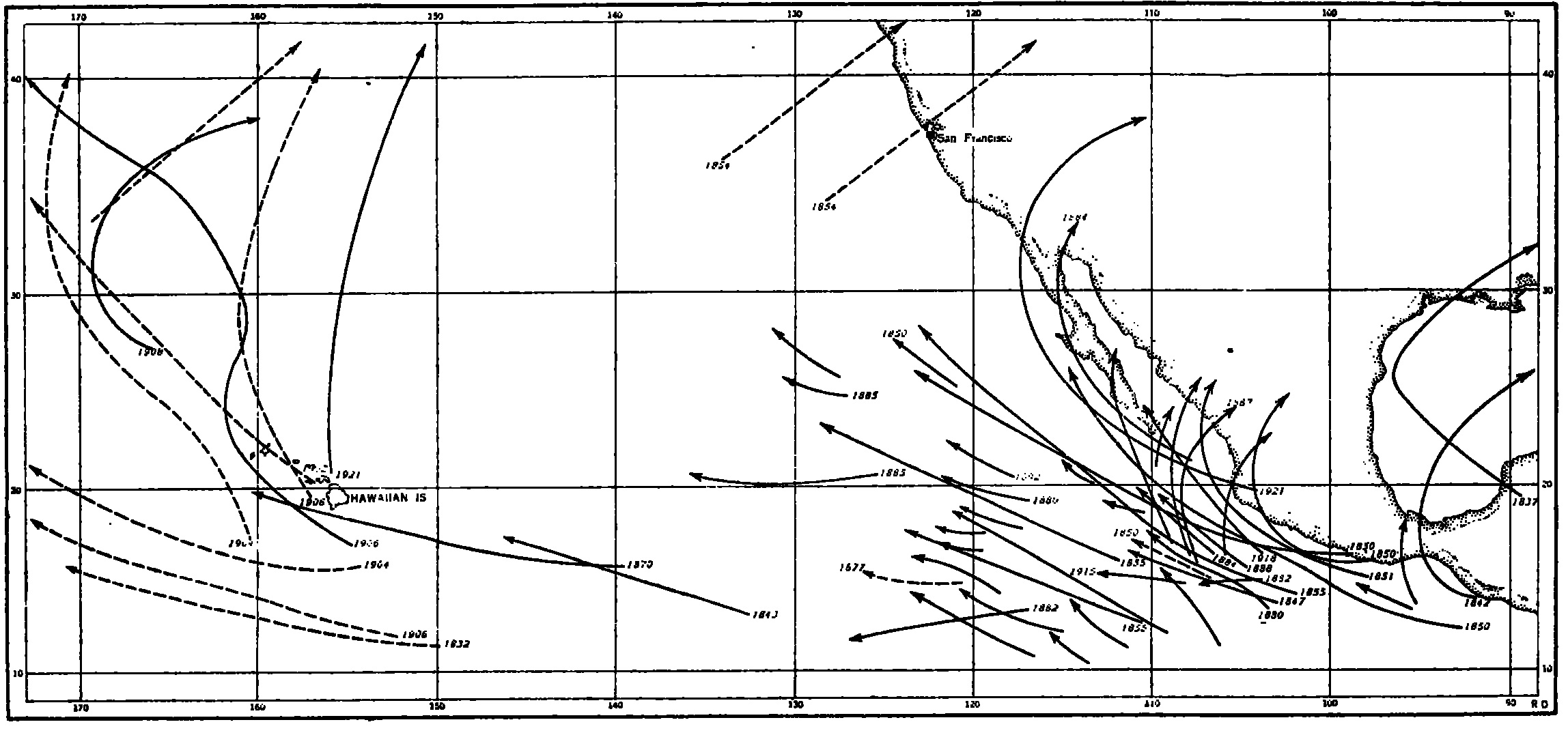 Trayectorias de los huracanes en el océano pacifico entre 1832 y 1922